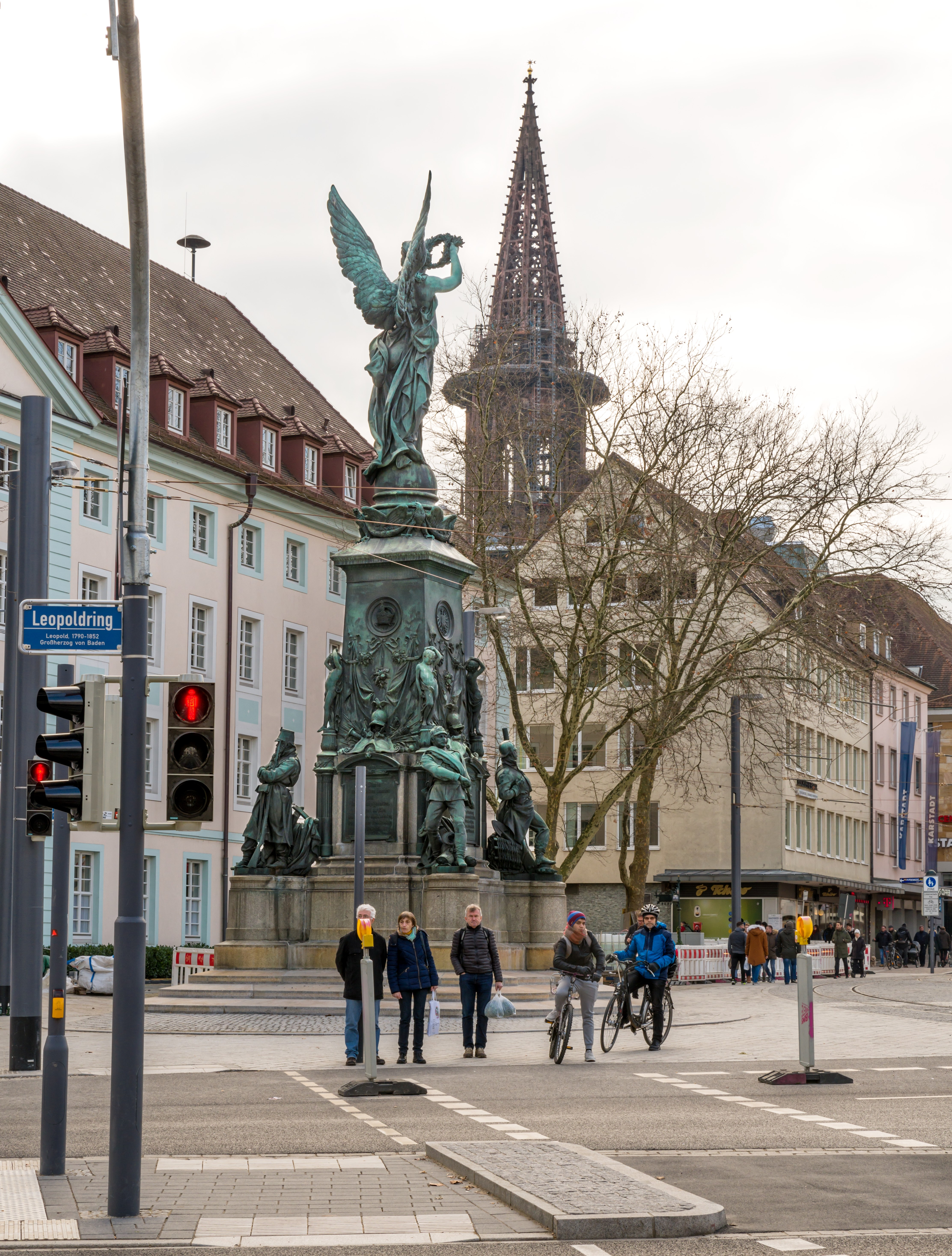 Bilder aus Freiburg